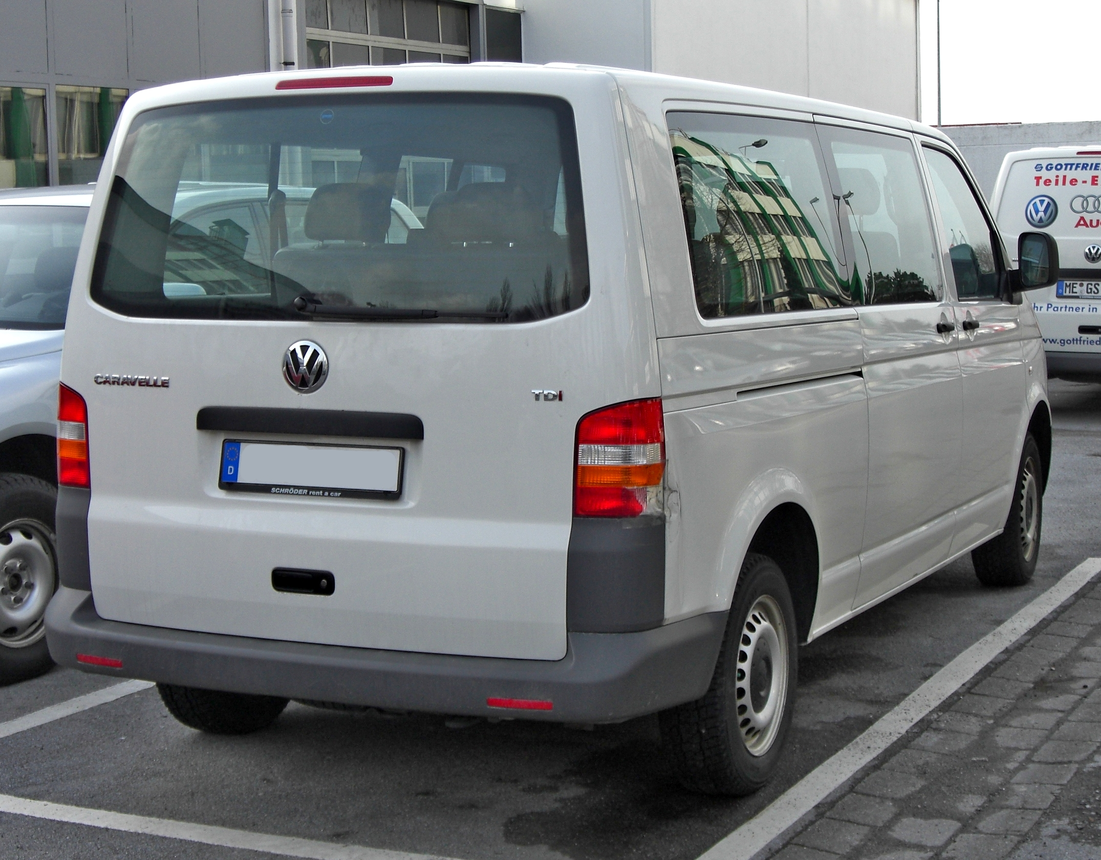 VW Caravelle